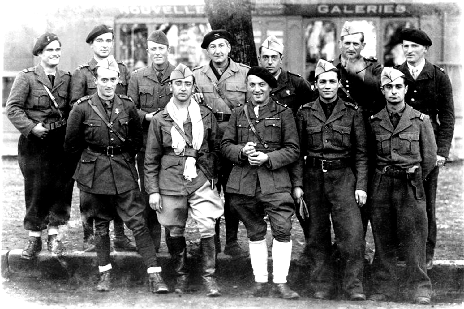 Corps franc Pommiès